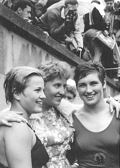 Zentralbild 23.8.1962 X. Europameisterschaften im Schwimmen, Springen und Wasserball 1962 in Leipzig. Damen-Finale im Turmspringen am 23.8.62. UBz.: Einen großartigen Erfolg erkämpften sich die Springerinnen der DDR im Turmspringen. Eine Goldmedaille für Ingrid Krämer (links) und Bronze für Gabriele Schöpe. Mit ihnen gemeinsam freut sich die Trainerin Ingrid Krämer Sibinsky.